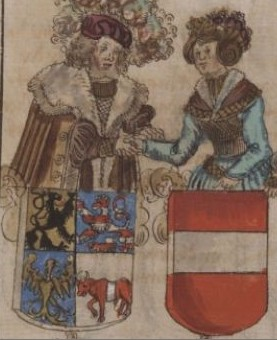 Jindřich III. Míšeňský a KOnstancie Babenberská